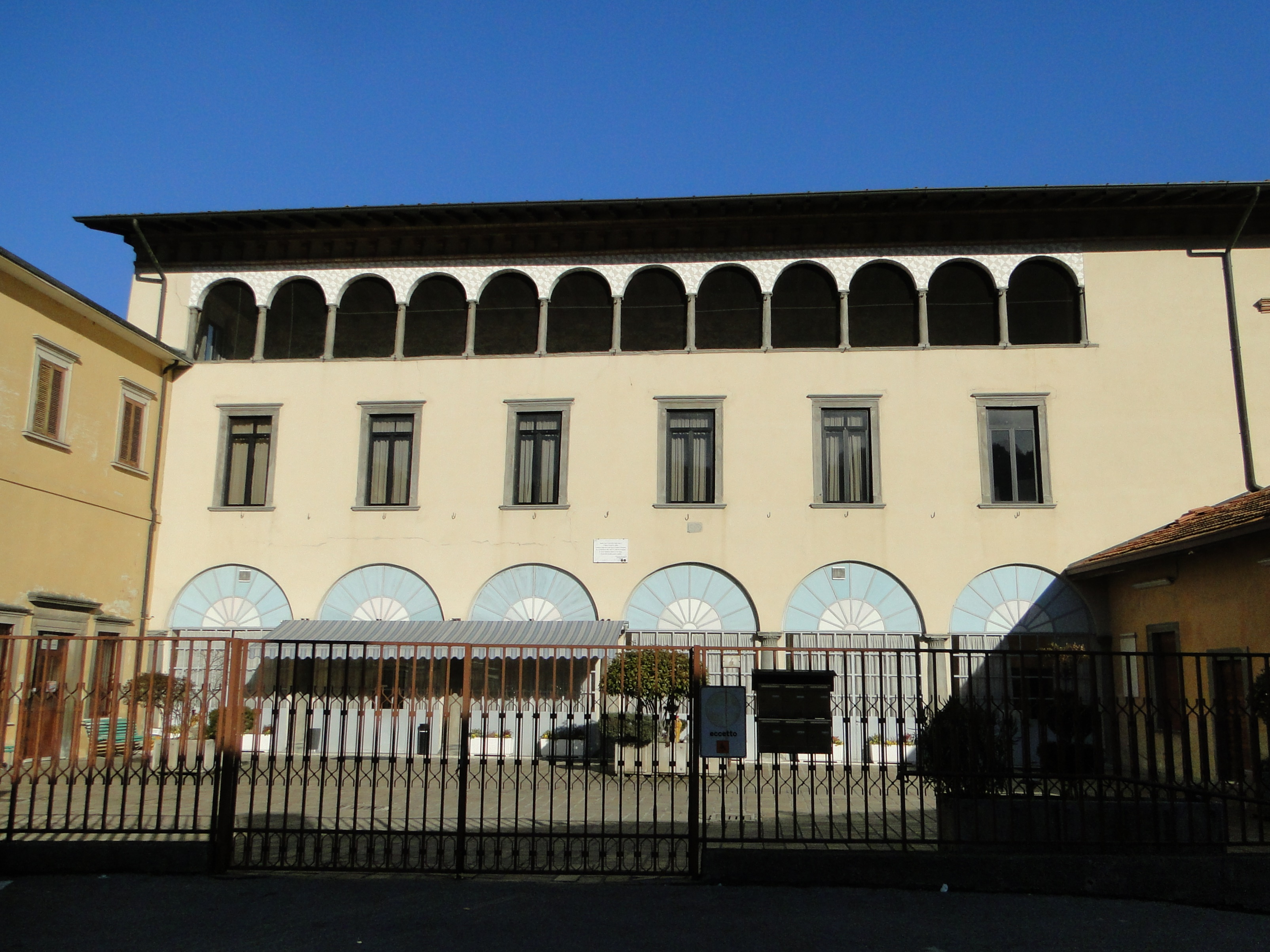 Palazzo Mosconi. Leffe (BG). Italy